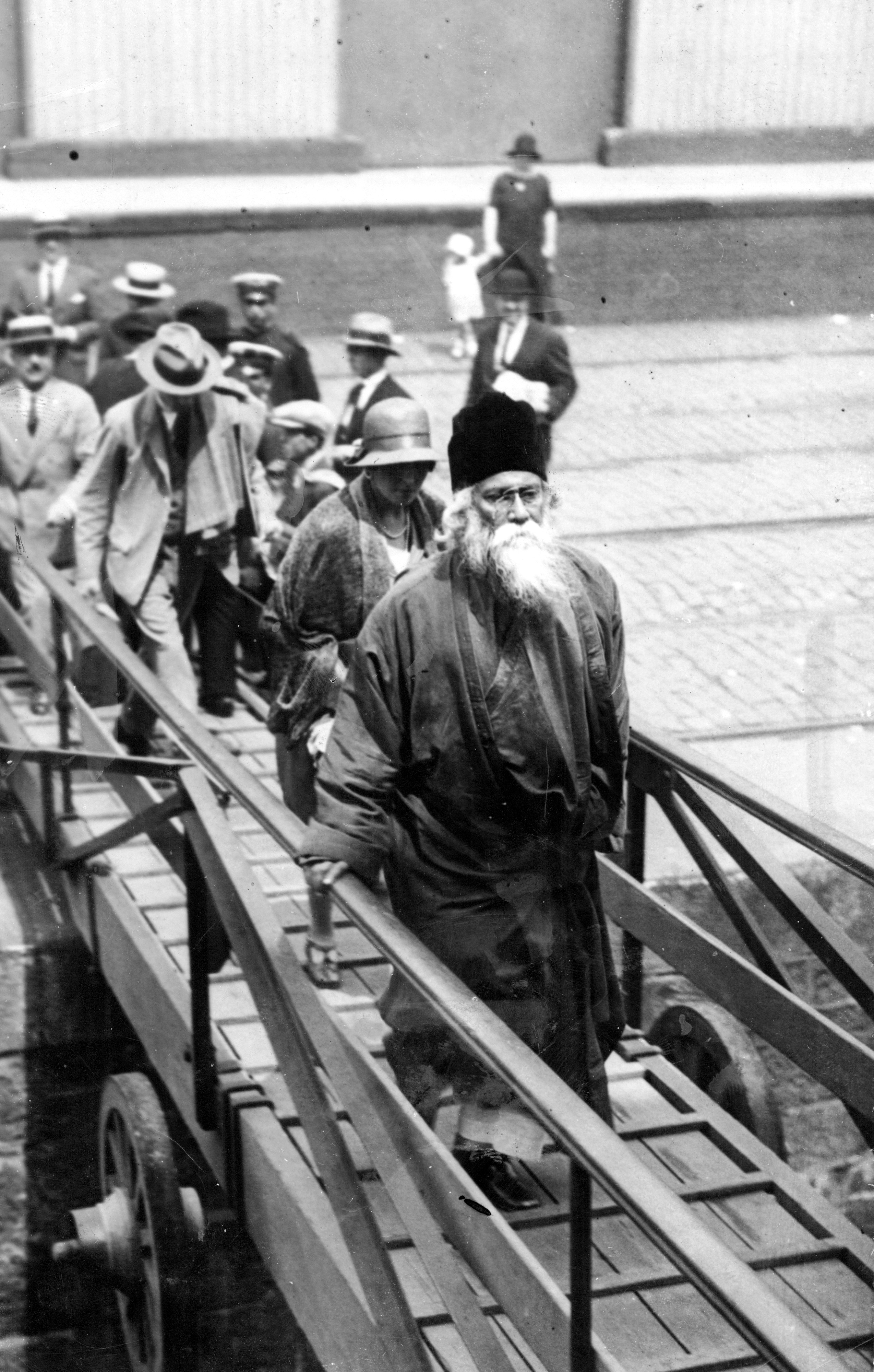 Rabindranath Tagore embarcando en Buenos Aires. Año 1924. Inventario 127820 General Archive of the Nation Native nameArchivo General de la Nación ArgentinaLocationBuenos Aires, ArgentinaCoordinates34° 36′ 17″ S, 58° 22′ 14″ W Established28 August 1821Web pageAGNAuthority control : Q2860529 ISNI: 0000 0001 2375 5869 institution QS:P195,Q2860529 This file, was provided to Wikimedia Commonsthanks to an agreement between the General Archive of the Nation of Argentina and Wikimedia Argentina.